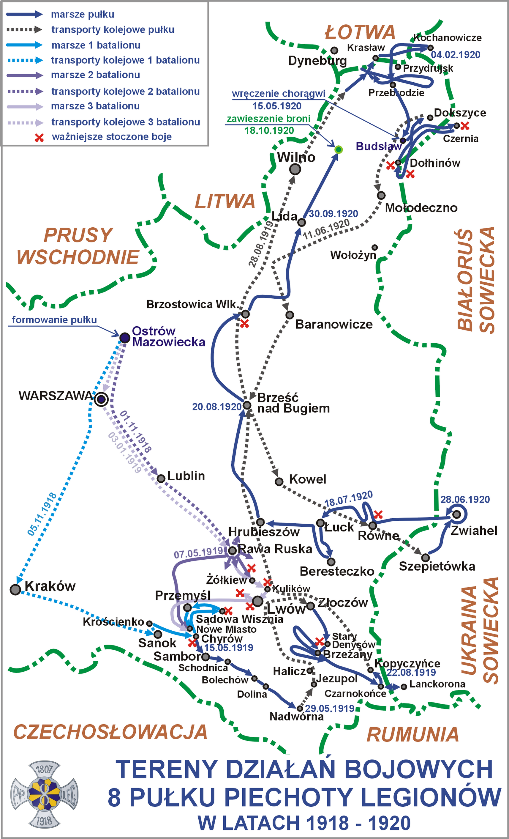 Tereny działań bojowych 8 Pułku Piechoty Legionów w latach 1918 - 1920